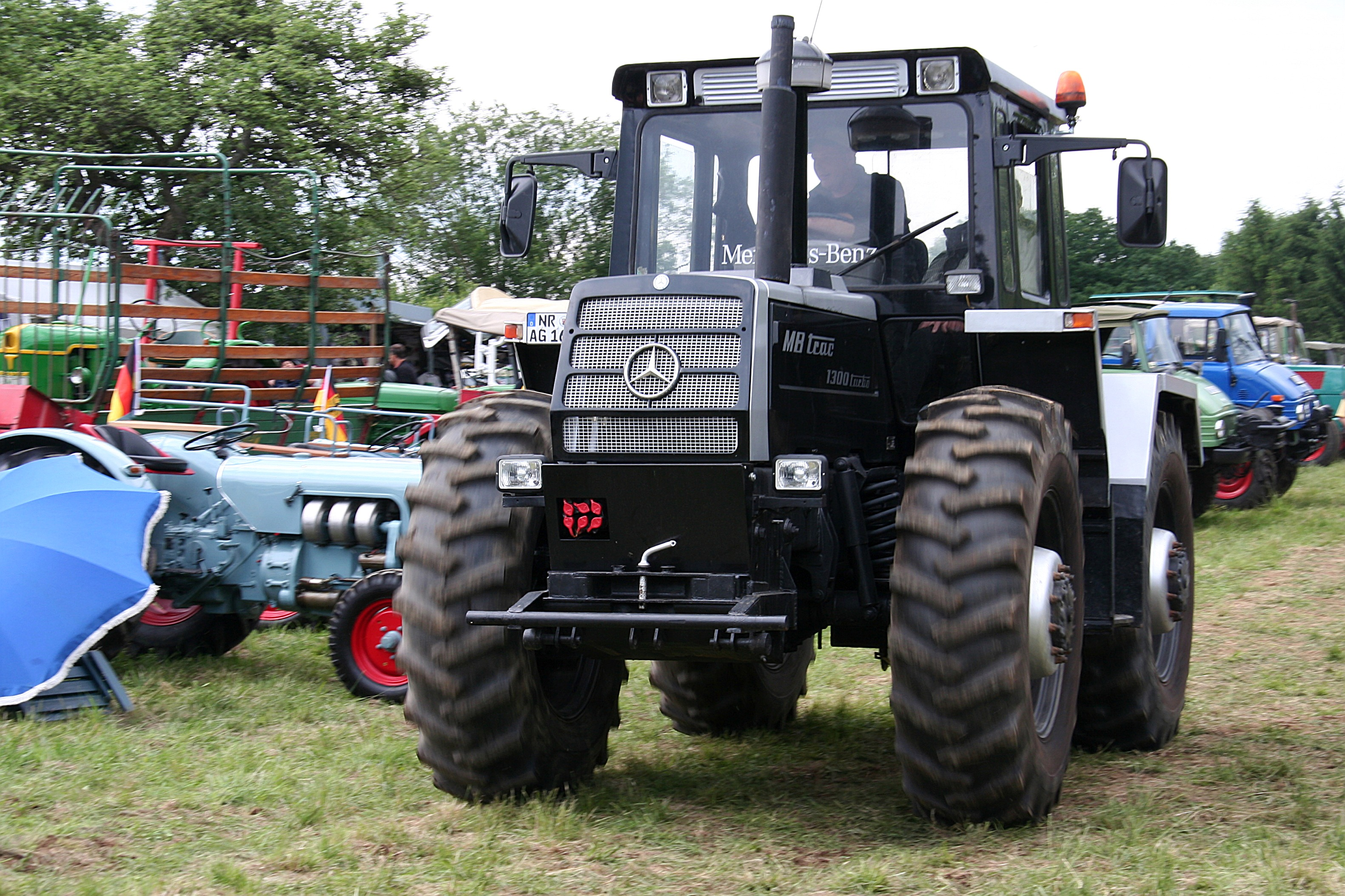 MB trac 1300 turbo